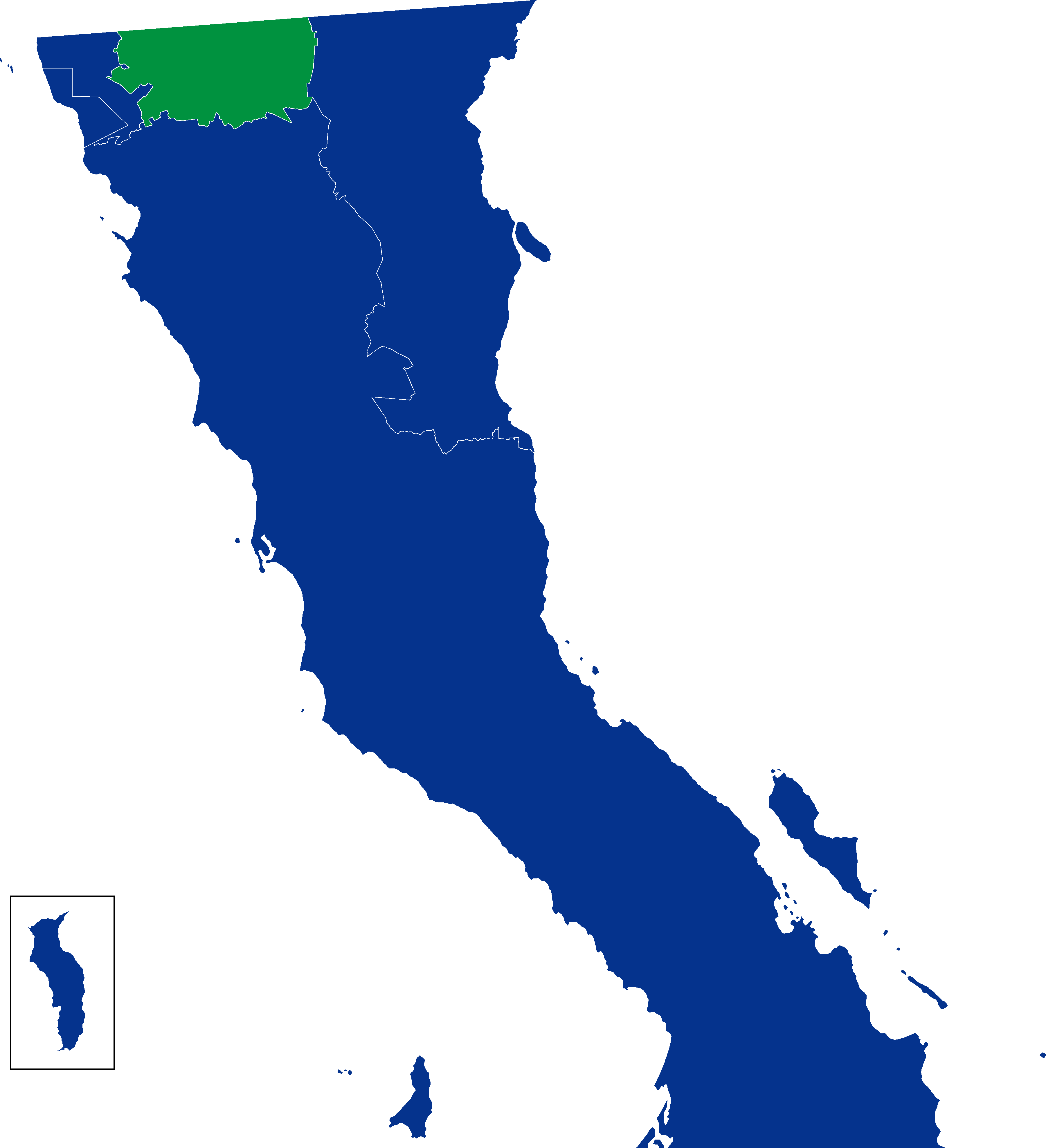 Resultados de la elección a Ayuntamientos por partido político en el estado de Baja California, México en 2001